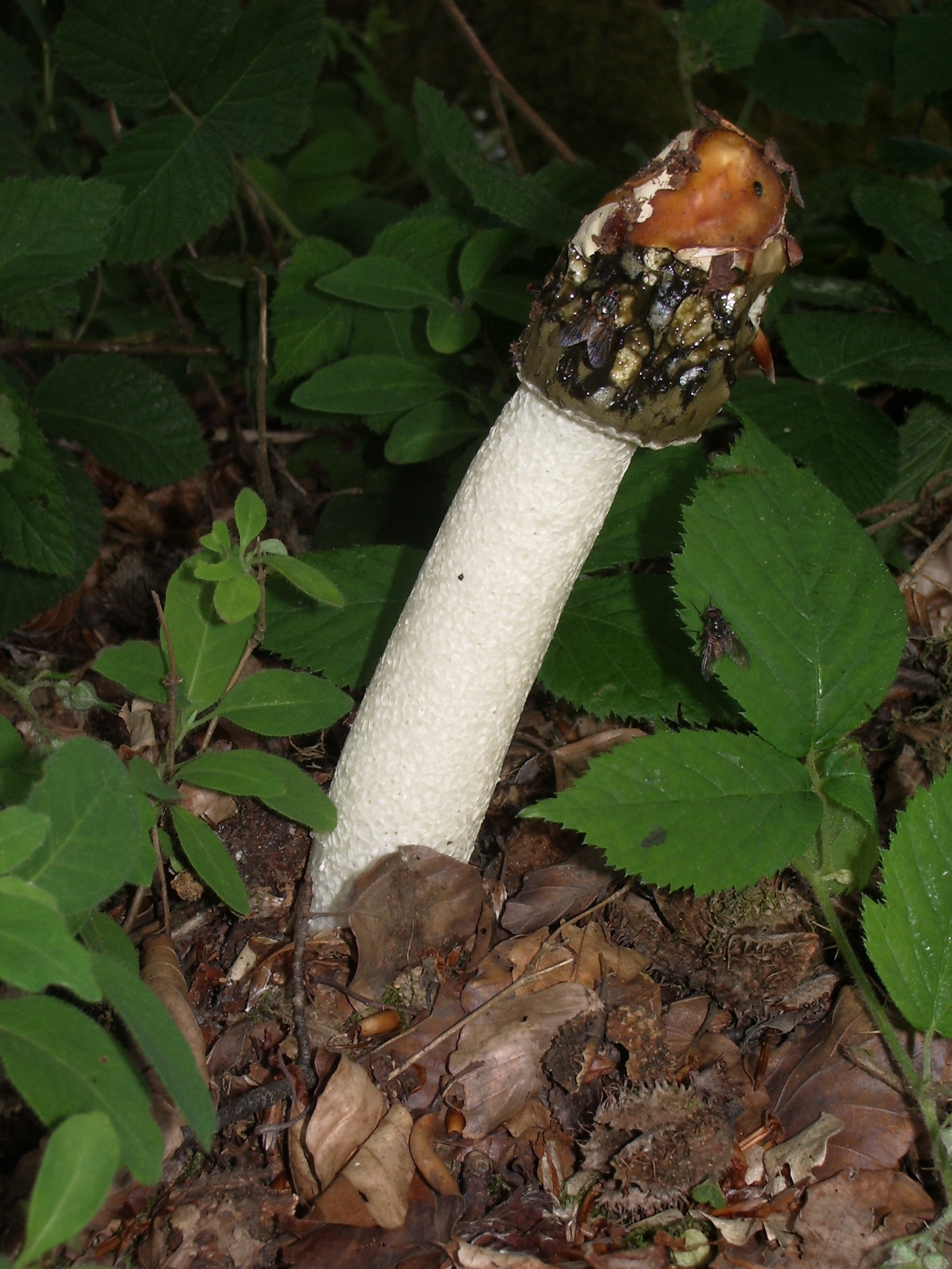 Champignon de la forêt de Crécy : Satyre puant, Phallus impudicus.